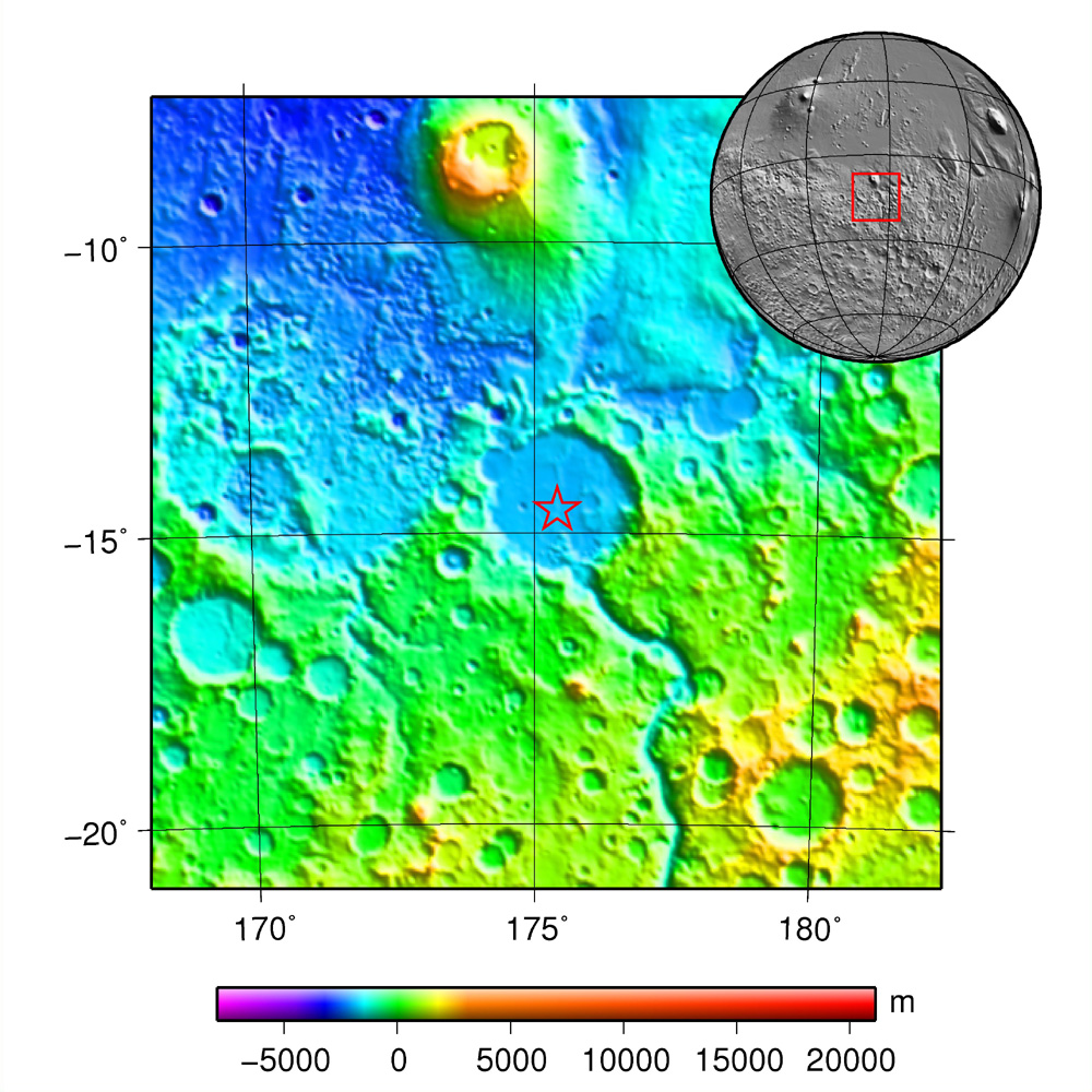 MER Spirit landing site